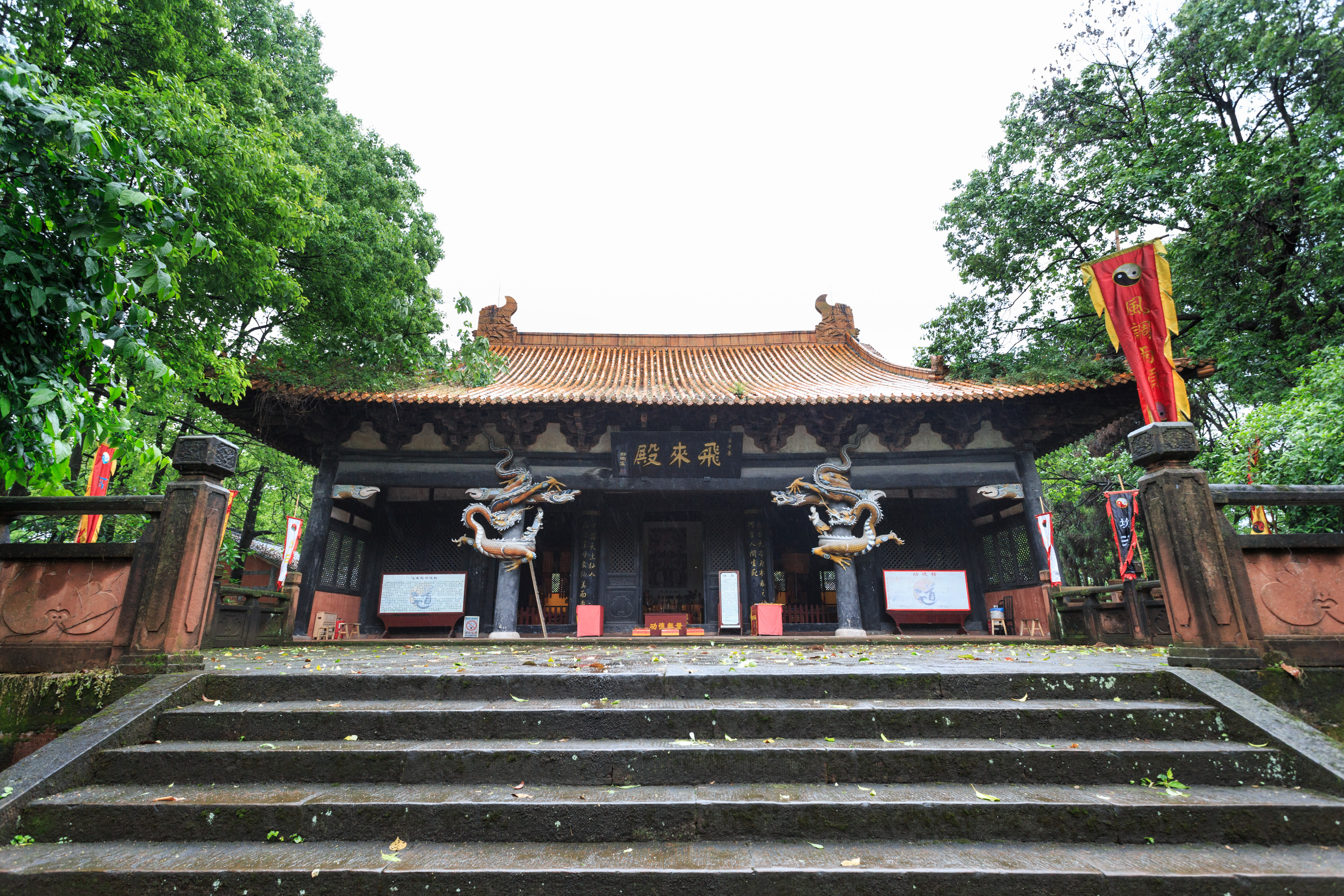 峨眉山市大庙飞来殿—— 飞来殿